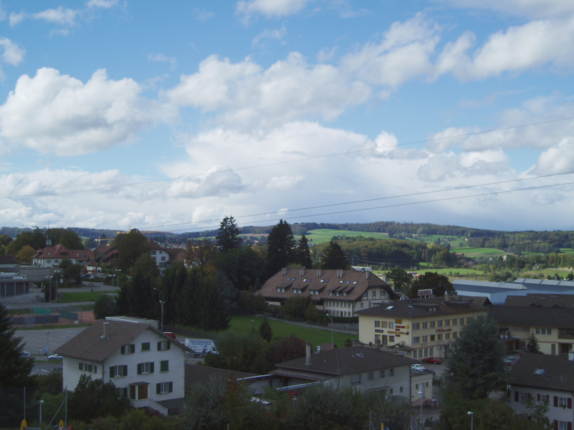 Givisiez